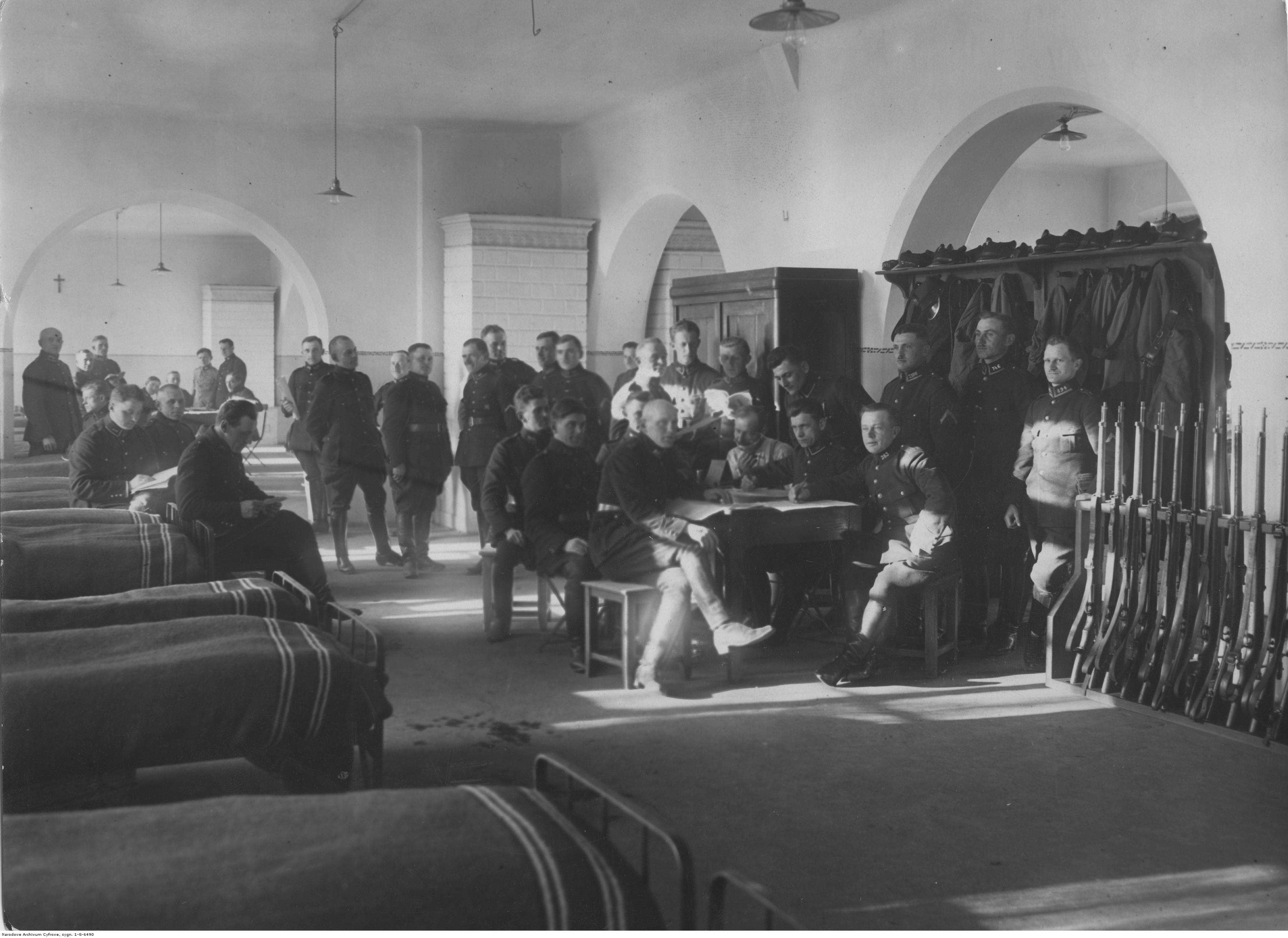 Centralna Szkoła Straży Celnej w Górze Kalwarii. Grupa szeregowych w sypialni. Koncern Ilustrowany Kurier Codzienny - Archiwum Ilustracji. Sygnatura: 1-G-6490